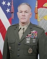 Portrait von Lieutennant General Richard C. Zilmer, Commanding General, III. Marine Expeditionary Force (III MEF) und Kommandeur der Marine Corps Bases Japan.